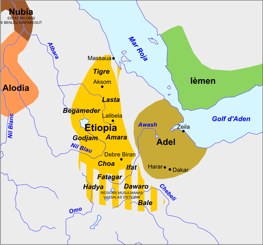 Etiopia au sègle XV.